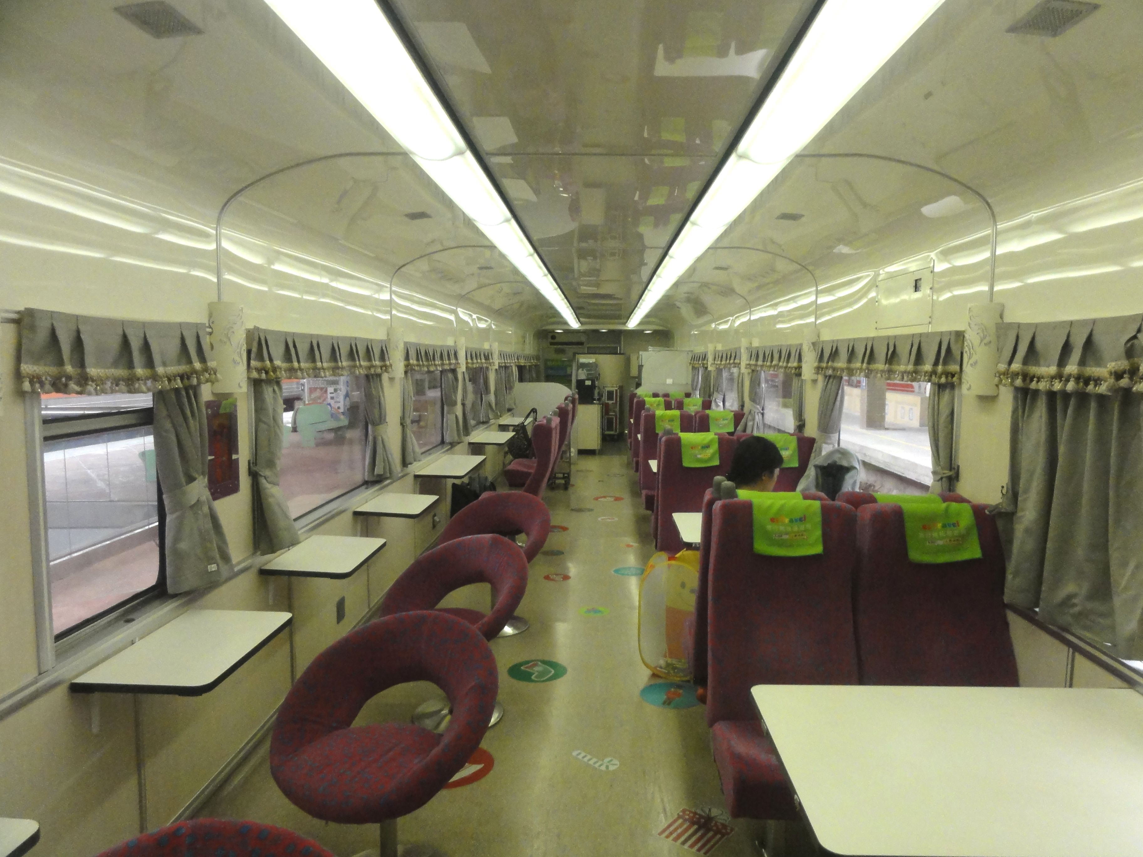 中文（台灣）: 臺灣鐵路管理局莒光號餐車35DC10507內部。